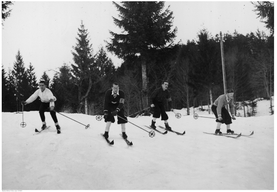 skieurs canadiens pendant l'entraînement. Visible comprennent: William Ball (2ème à droite), Tom Mobraaten (1er à droite).